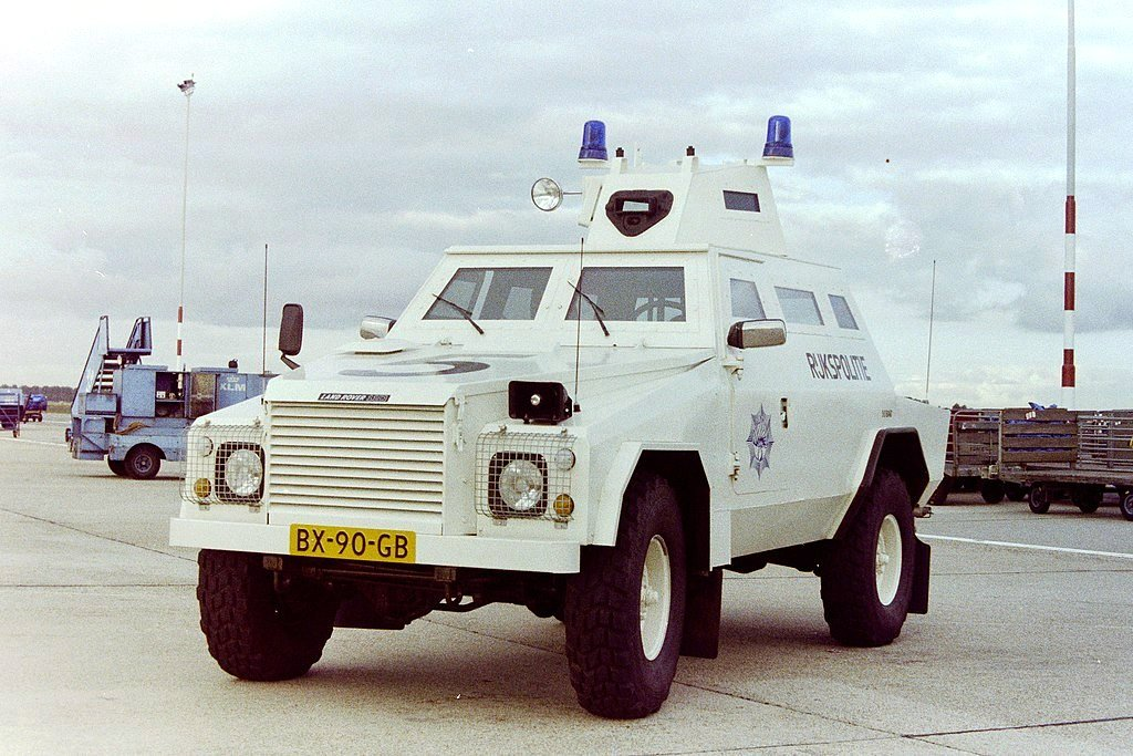 Shorland MK5 Armoured Patrol Car Amsterdam Airport 1991